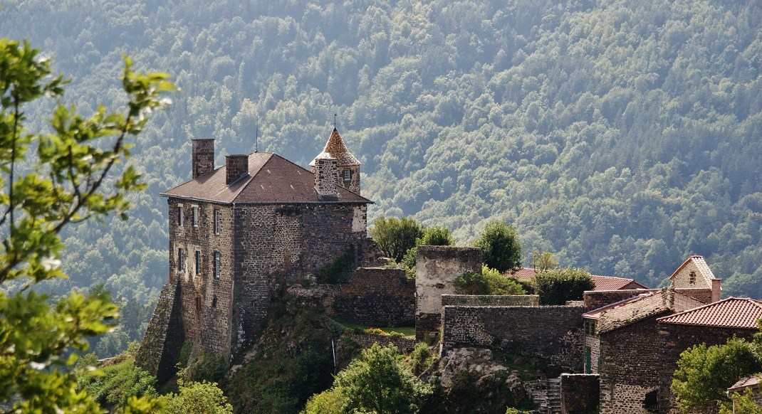 Le Château